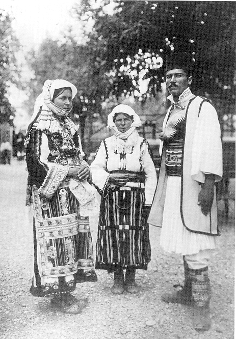 Селяни от Кучевище